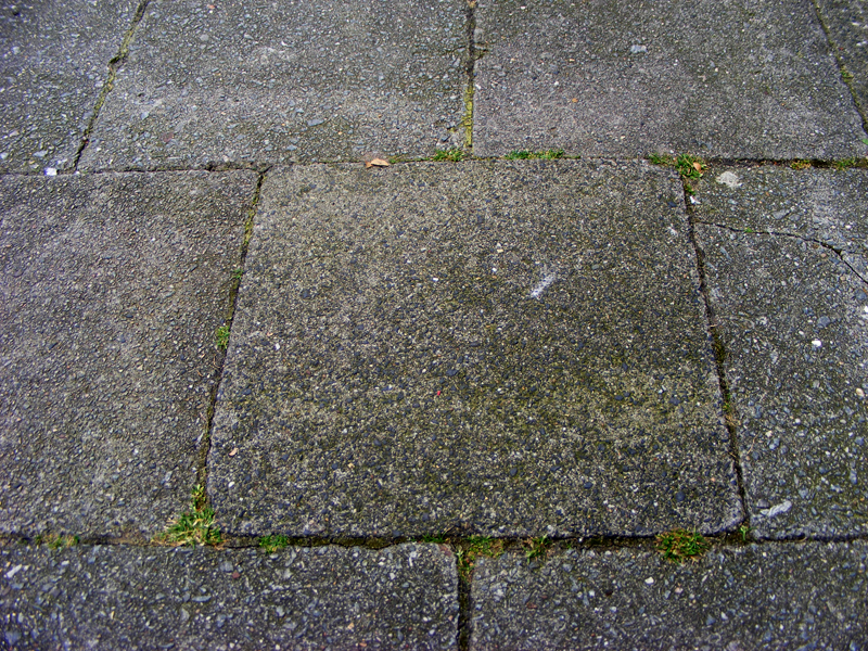 Een standaard stoeptegel in halfsteensverband. Het meest toegepaste element van geprefabriceerd beton: de stoeptegel van 30x30 cm.